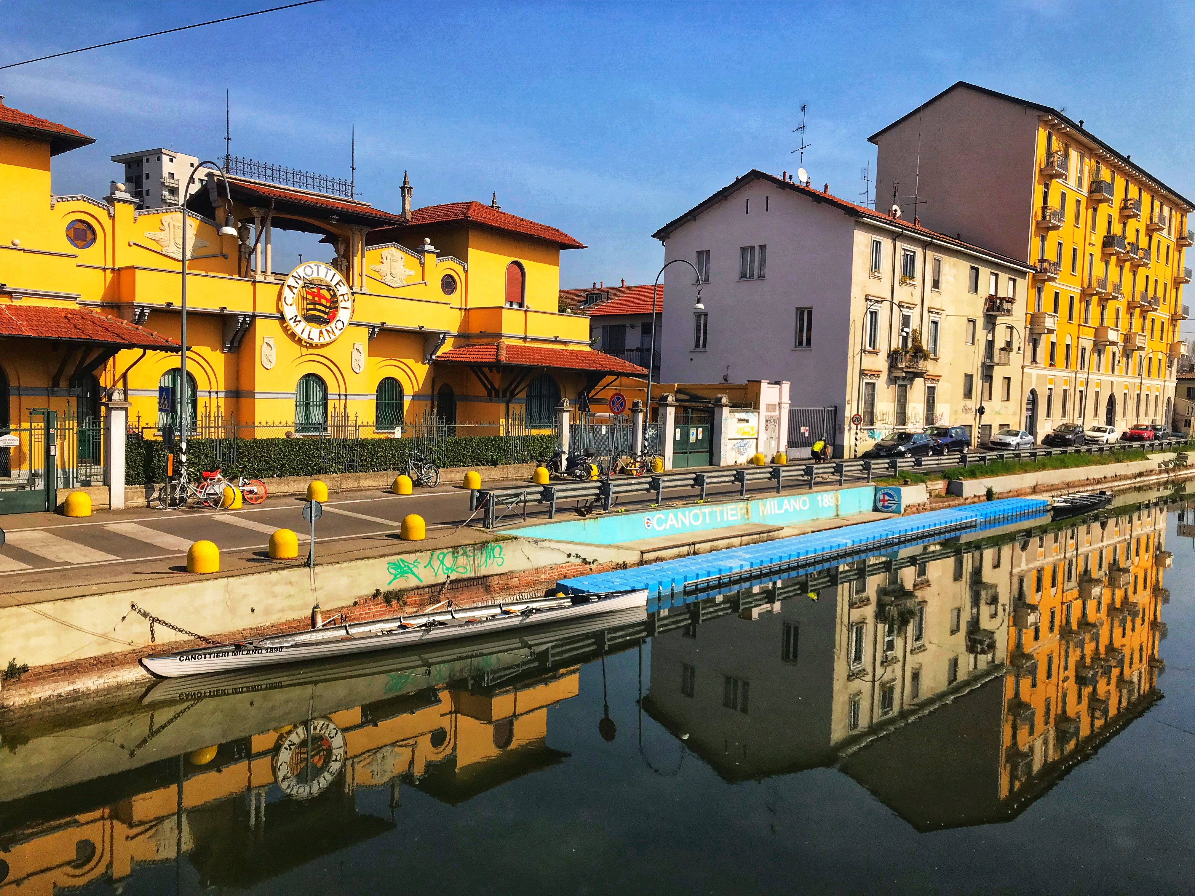 La facciata della Canottieri Milano con il pontile antistante - affacciata sul Naviglio Grande. Caratteristico lo stile liberty (art deco) dei primi anni dl '900. La sede attuale è stata edificata negli anni '20, dopo il trasferimento dalla Darsena.